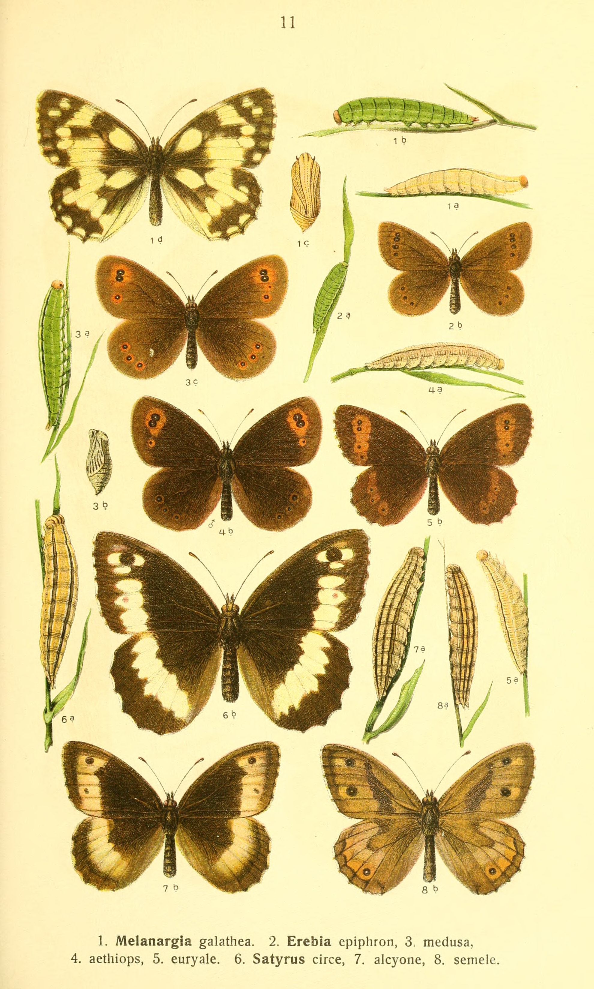 Plate from Die Schmetterlinge Deutschlands mit besonderer Berücksichtigung ihrer Biologie, Bd. 1-4, by K. Eckstein